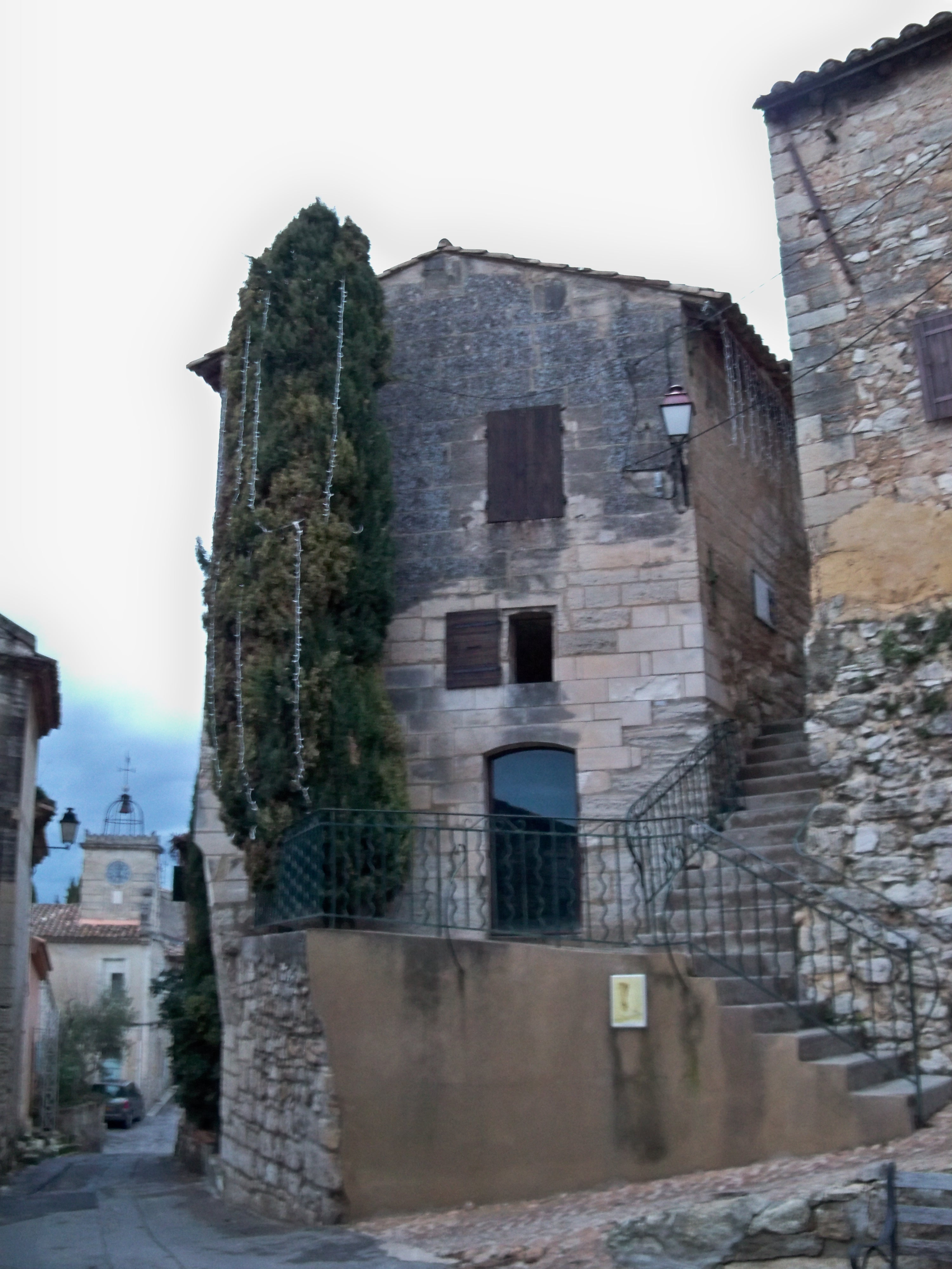 Maison du four banal dans le vieux village des Angles, Gard, France